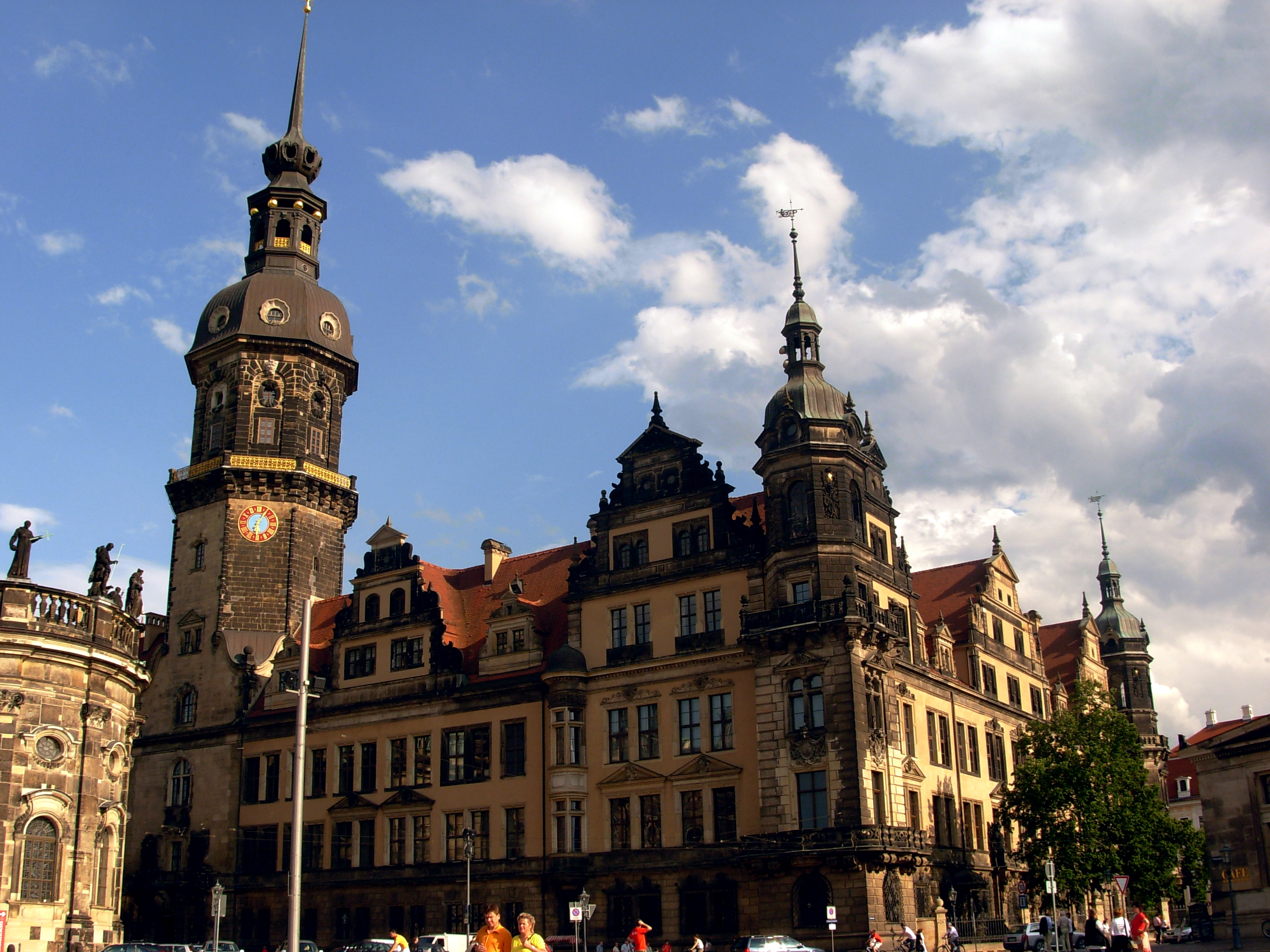 Residenzschloss Dresden/Drezdeno elektorių rezidencinė pilis